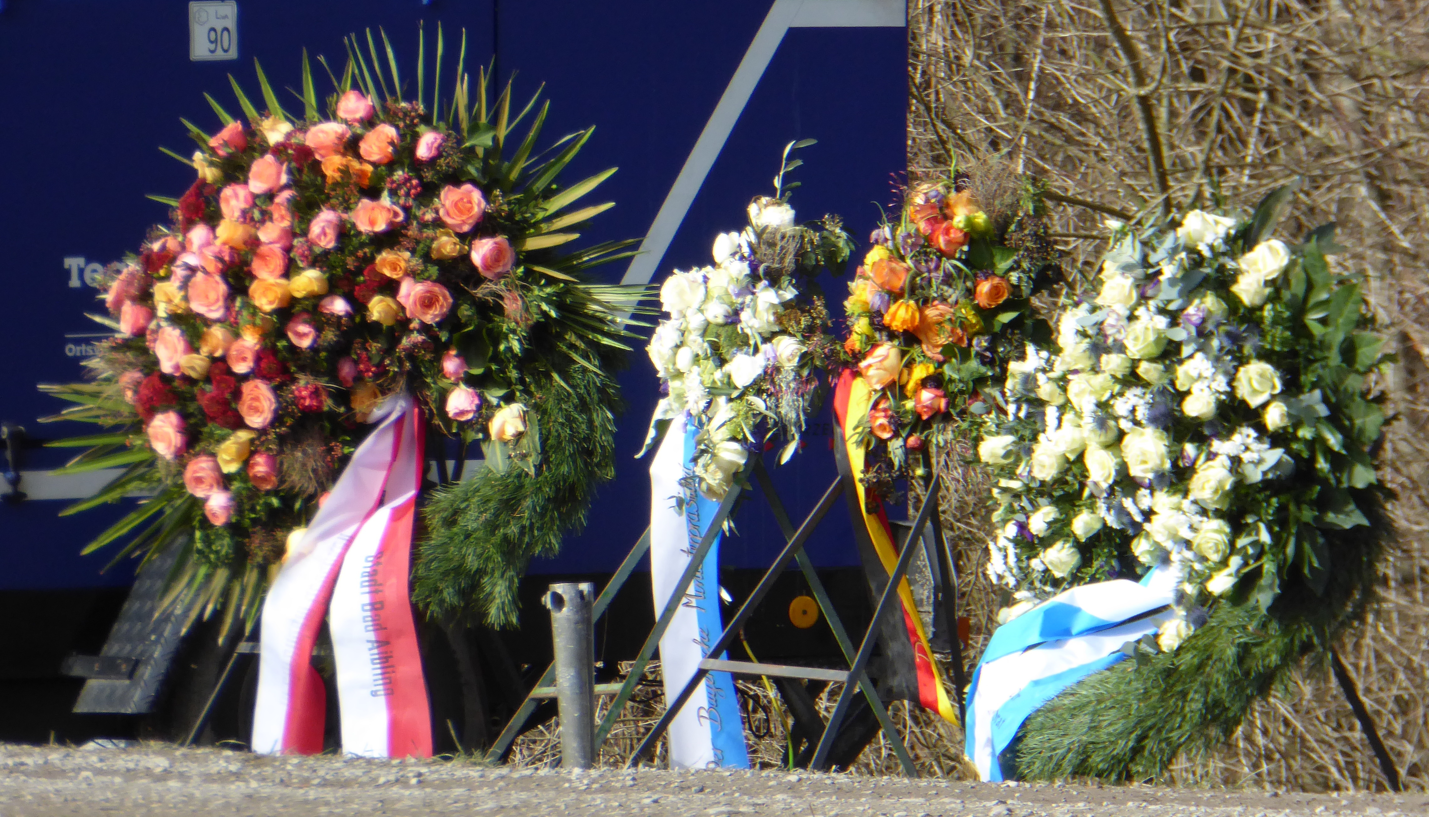 Trauerkränze für die Opfer des Zugunglücks vom 2016-02-09 bei Bad Aibling, von der Stadt Bad Aibling, der bayerischen Regierung, der Bundesregierung und dem Kreis Rosenheim.